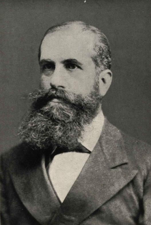 Ludwig von Sybel (1846–1929), deutscher Klassischer und Christlicher Archäologe. Fotografie um 1880 aus der Bildnissammlung Marburger Universitätslehrer